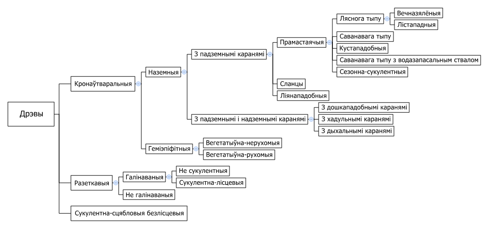 Схема класіфікацыі жыццёвых формаў дрэваў паводле І. Р. Серабракова